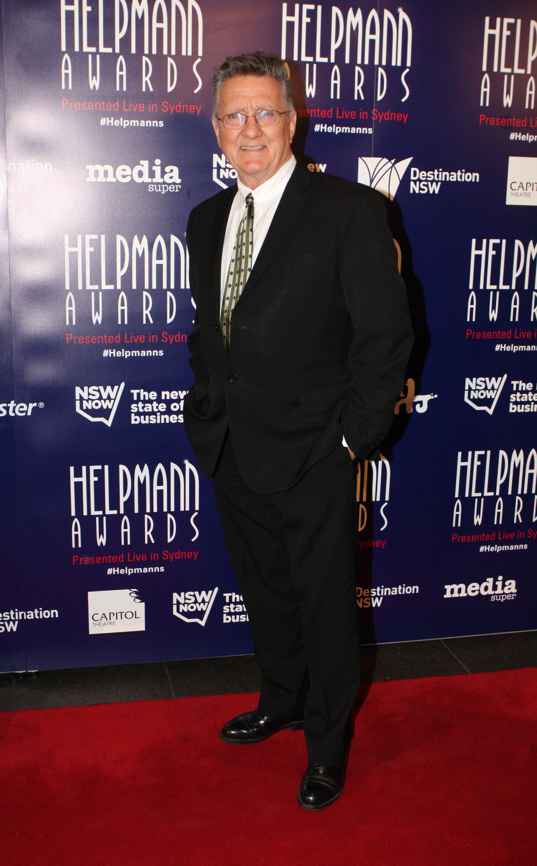 helpmann awards